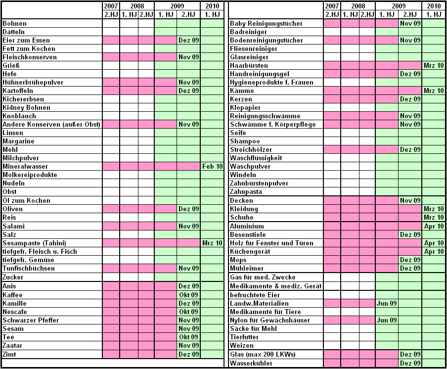 Tabelle der in den Jahren 2007 bis 2010 in den Gazastreifen zulässigen Importe.